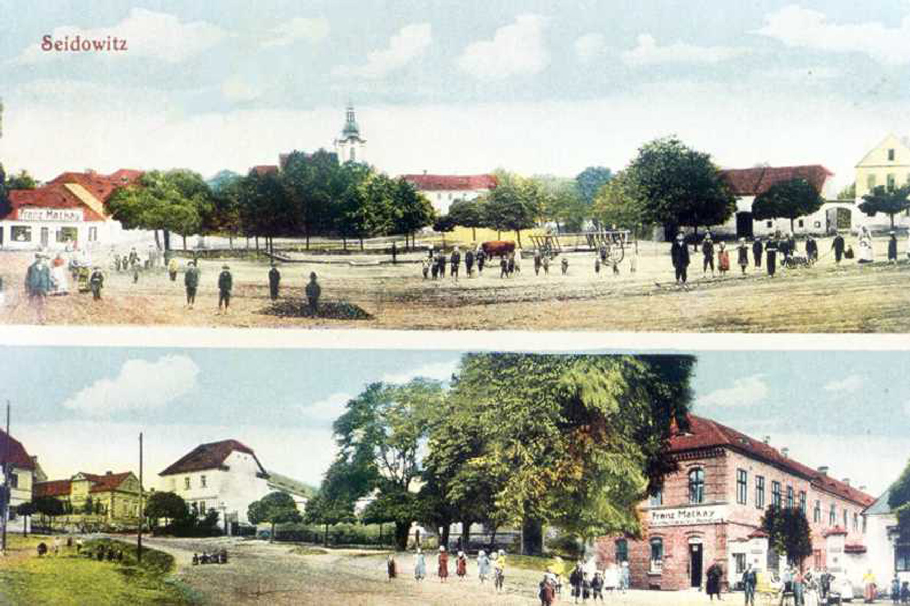 Ehemalige Gemeinde Židovice (Seidowitz) bei Most (Brüx) in Tschechien.